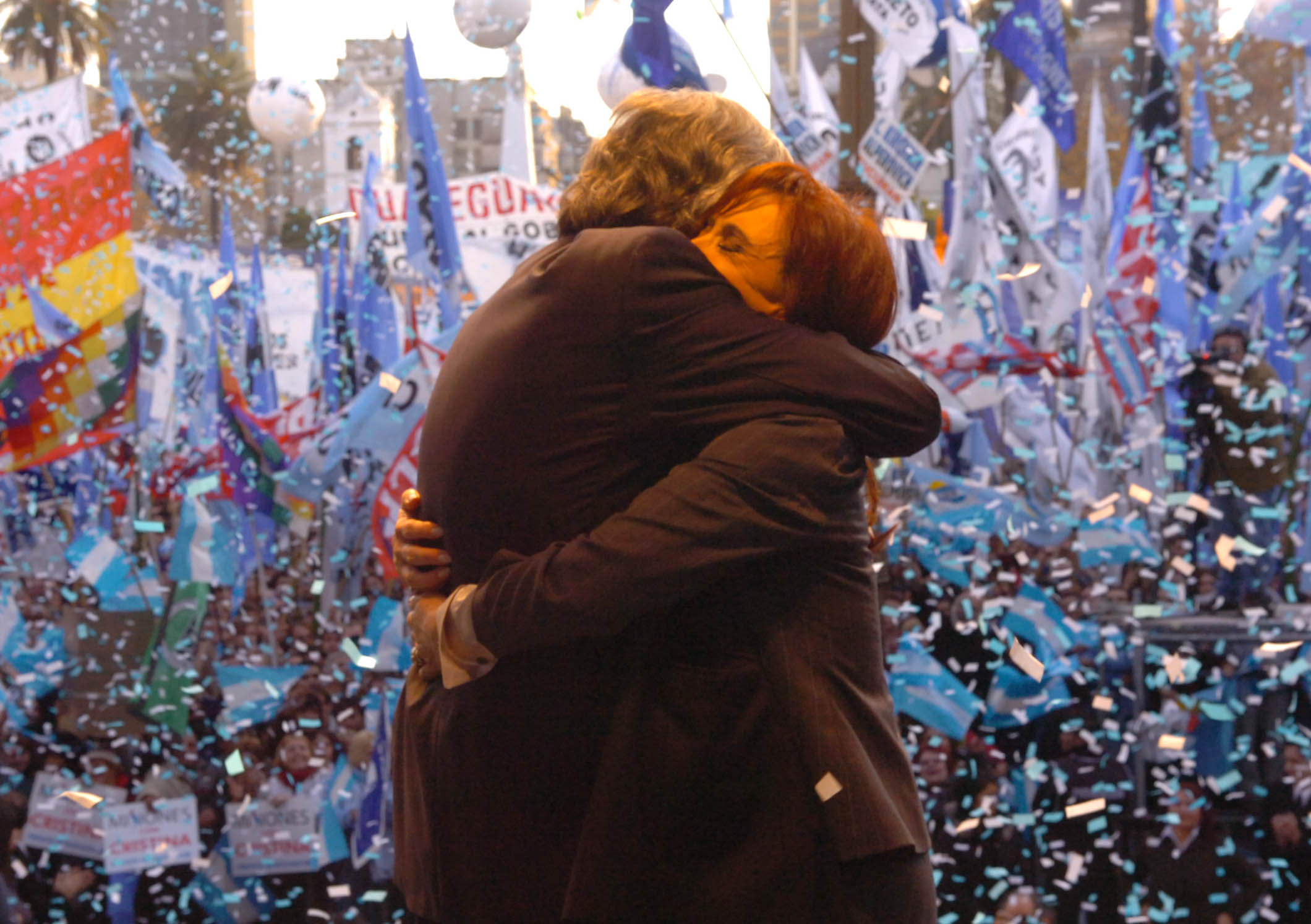 Cristina Fernandez y Néstor Kirchner en un acto en Plaza de Mayo en 2008.